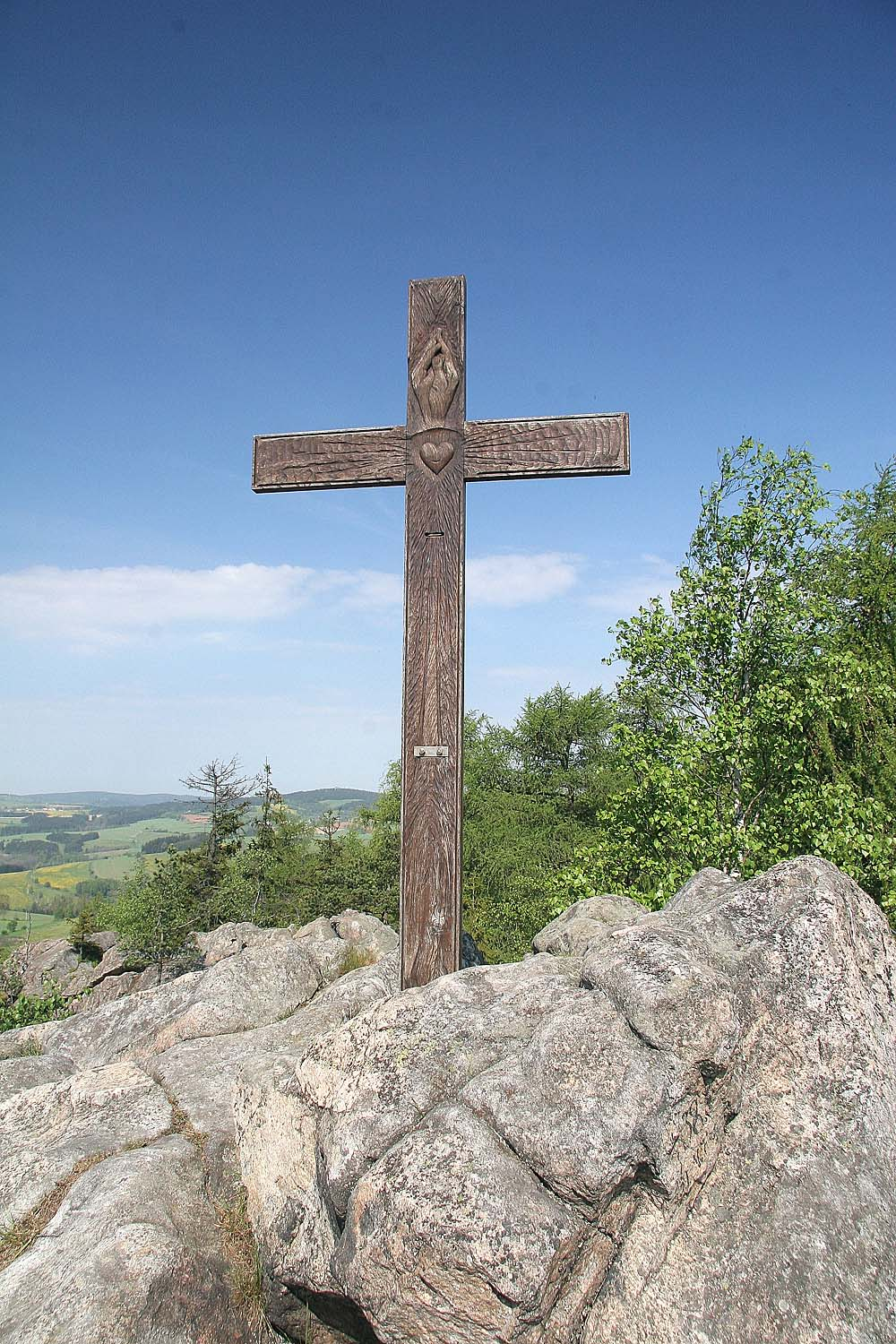 Přírodní památka Prosíčka, district Žďár nad Sázavou